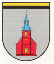 Wappen von Altenkirchen